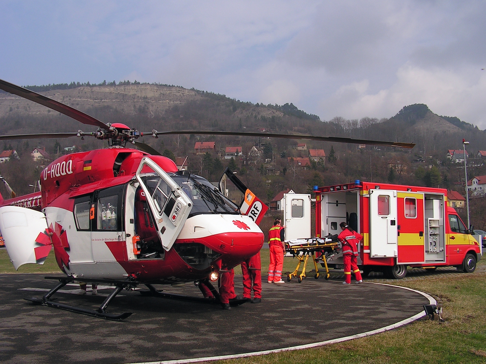 DRF Deutsche Rettungsflugwacht DRF Eurocopter BK-117B-2 und Feuerwehr-Notarztwagen Foto 2005 Wolfgang Pehlemann Wiesbaden PICT0014.jpg